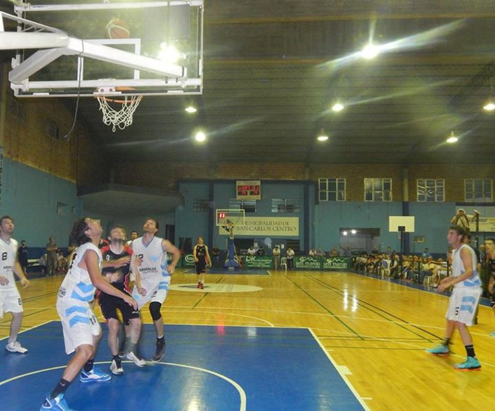 partido oficial de basquet argentino de san carlos